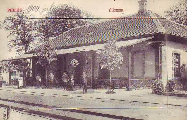 Железничка станица, Палић